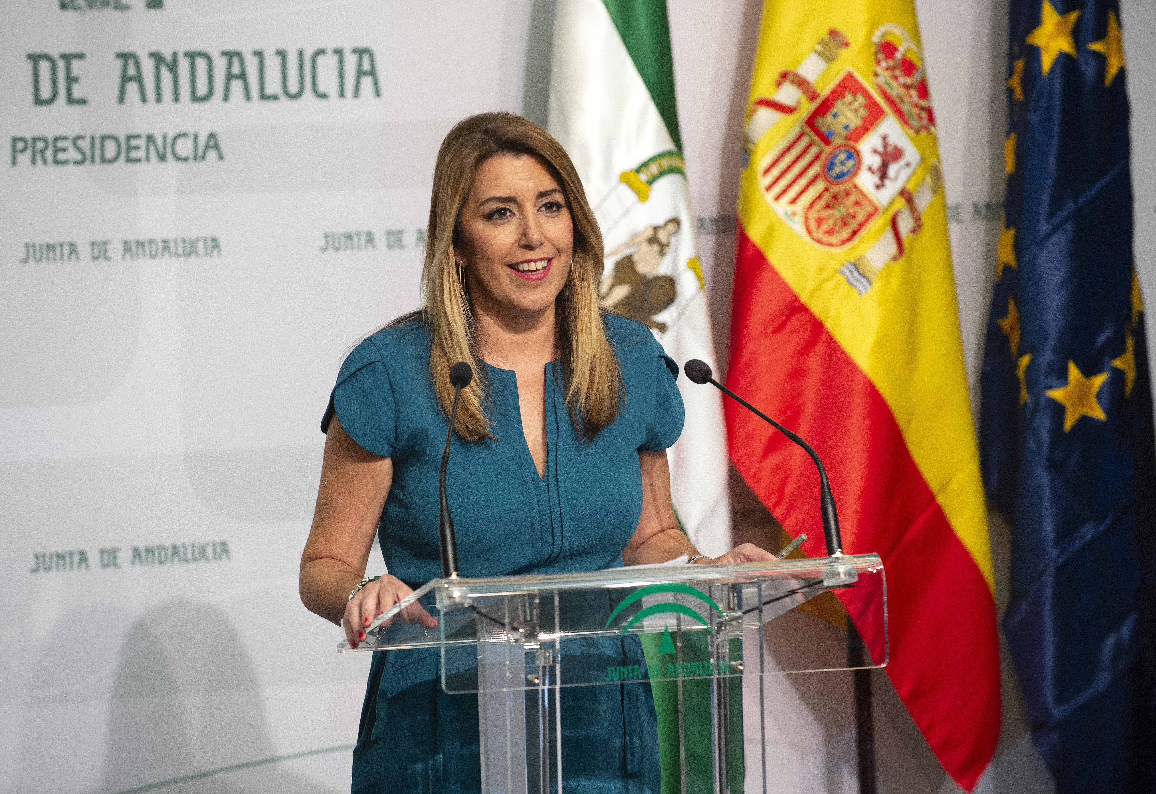 La presidenta de la Junta de Andalucía, Susana Díaz, firma el decreto de disolución del Parlamento de Andalucía y la convocatoria de elecciones autonómicas para el próximo 2 de diciembre.